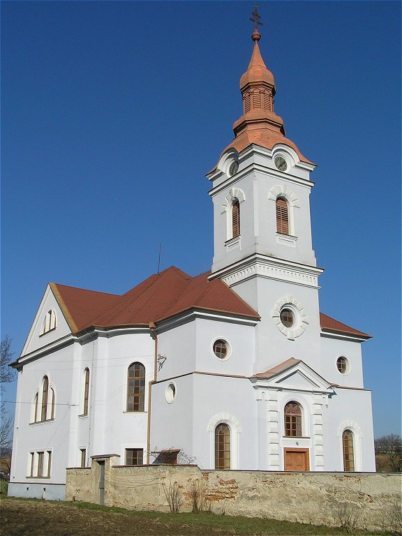 Evanjelický kostol A.V., Vrbové. Kostol z roku 1929, veža z roku 1896.